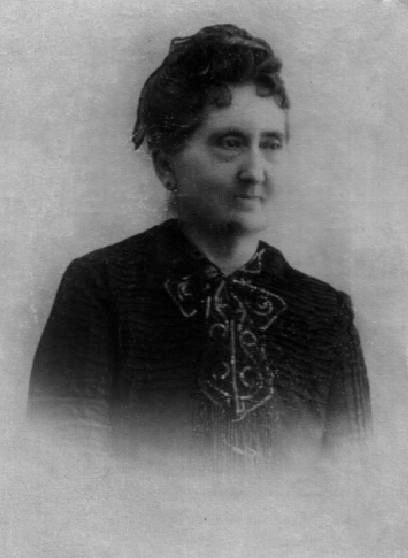 Retrato de Encarnación Encina y Ordoñez